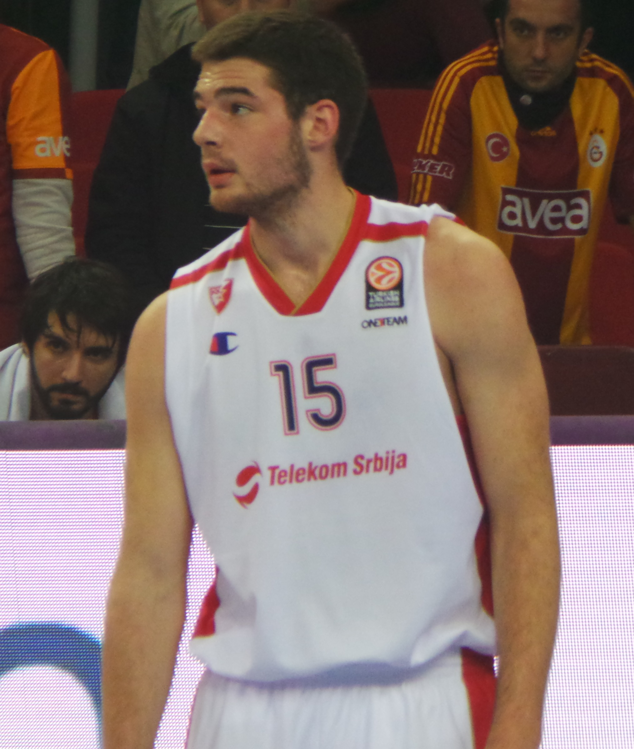 Marko Tejić